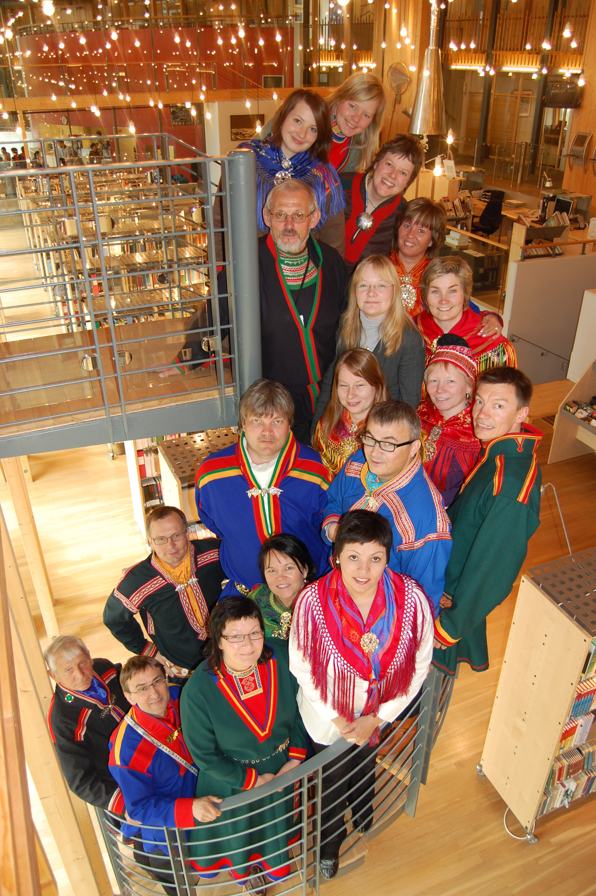 Sametingsgruppa til Norske Samers Riksforbund (NSR) for valgperioden 2005-2009.